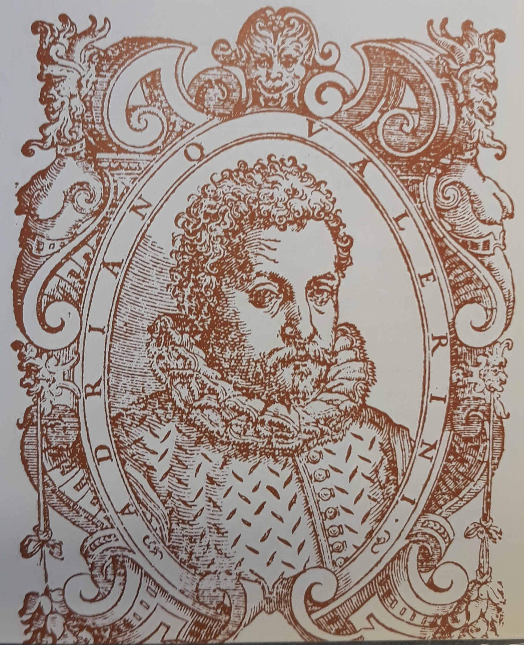 Attore Adriano Valerini